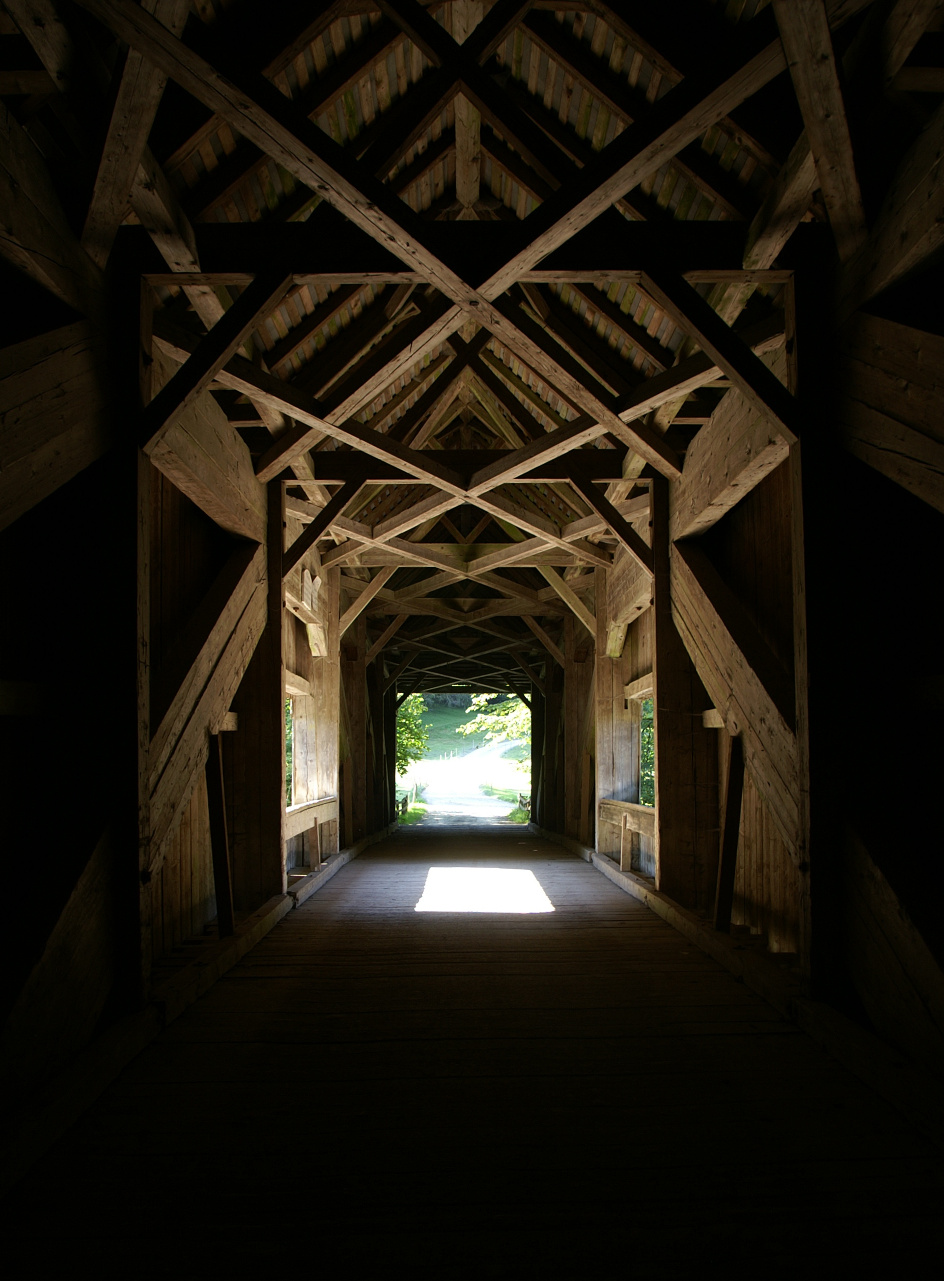 aus dem DEHIO Vorarlberg 1983: Gschwendtobel-Brücke über die Subersach. Errichtet 1830 nach Plänen von Alois Negrelli. Gedeckte Holzbrücke mit 6fach verstärktem Hängesprengwerk. *** In Lingenau im Bregenzerwald , Vorarlberg